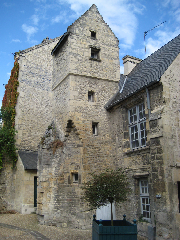 Maison du Grenadier du Quartier Lorge à Caen